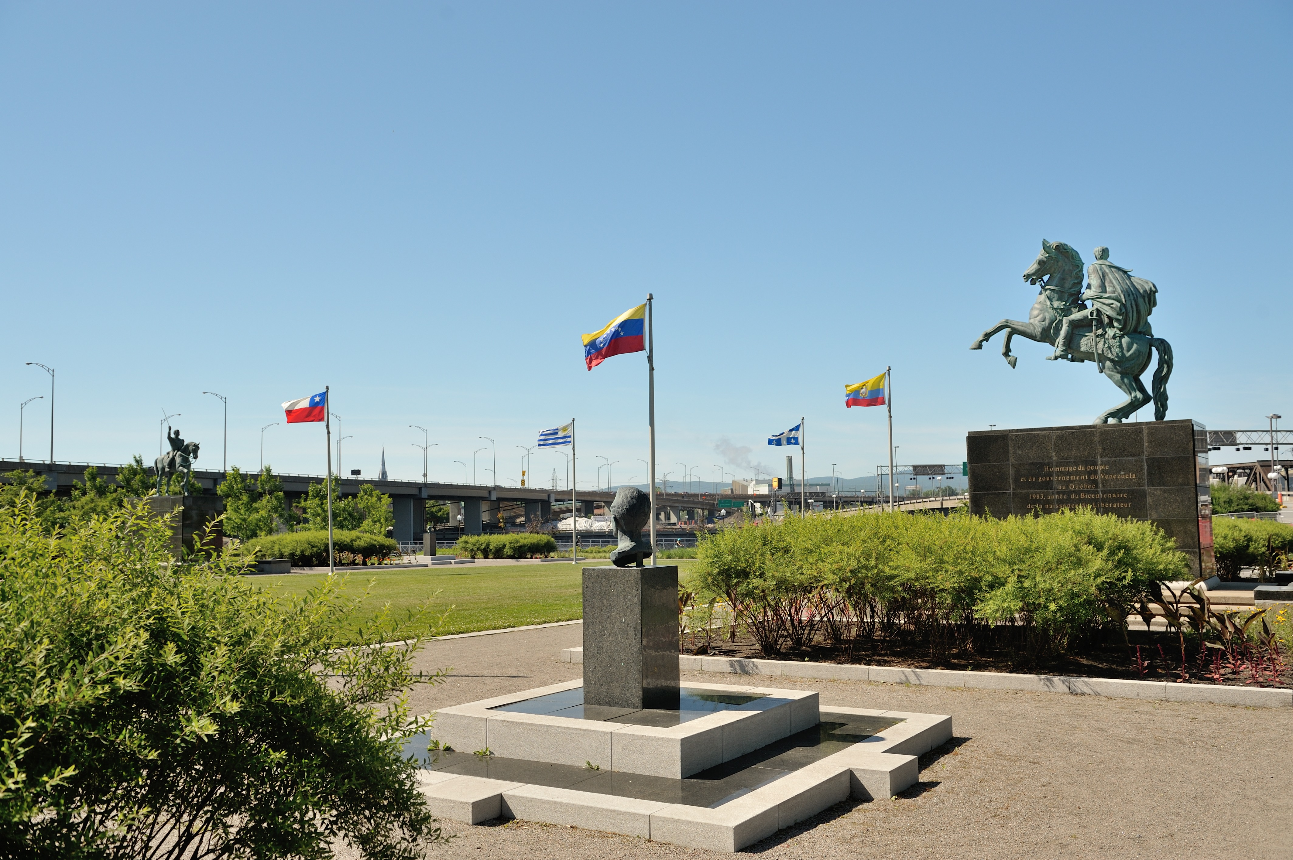 Le parc de l'Amérique-Latine est situé dans la basse-ville de Québec, entre le Palais de justice et l'embouchure de la rivière Saint-Charles. Ce parc, conçu pour la détente, est également accessible par la piste cyclable qui longue la rivière Saint-Charles.